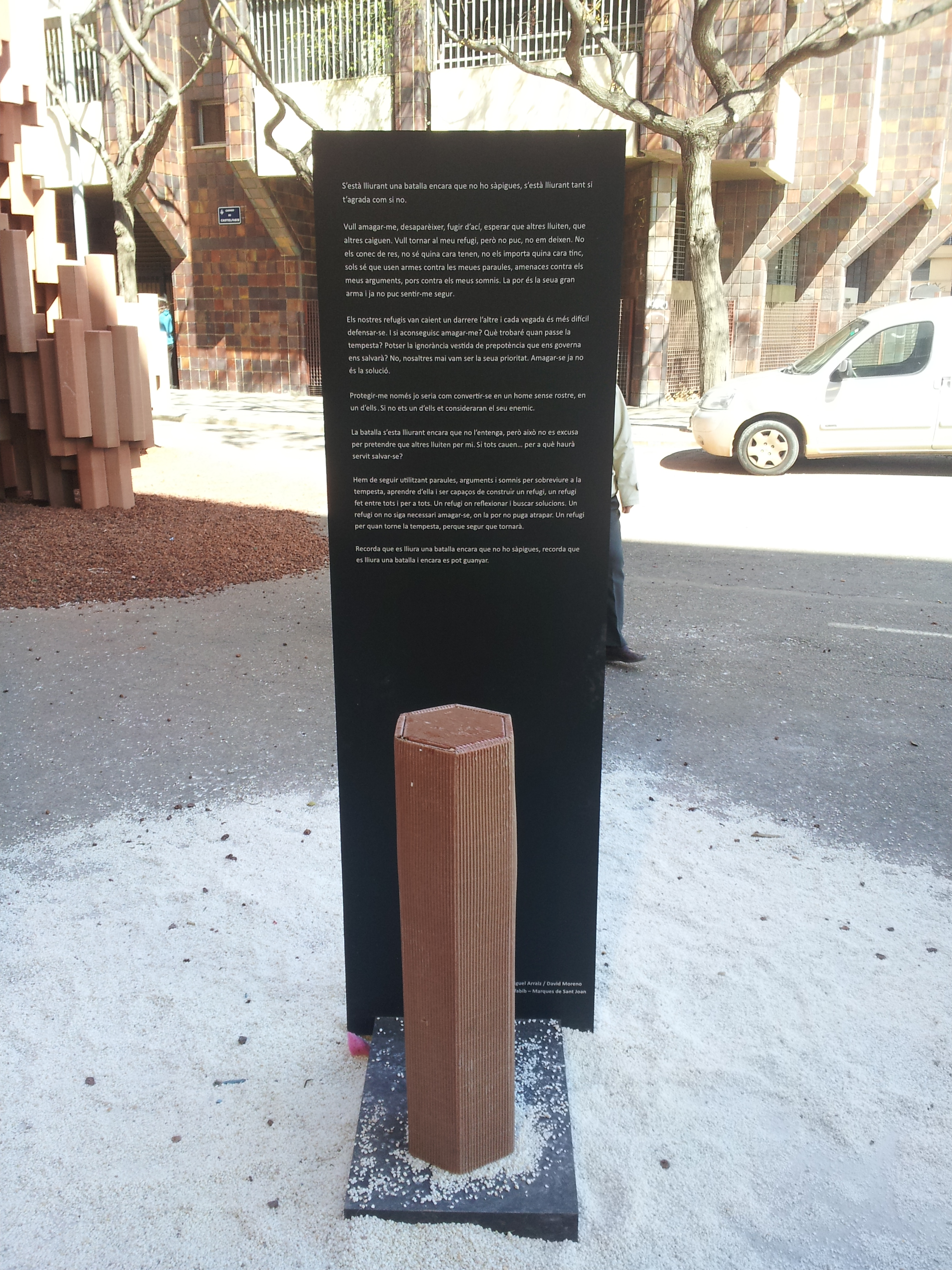 Monument de Castielfabib 2013.